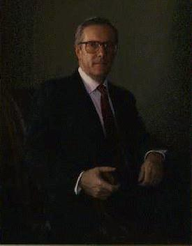 Bill Brock